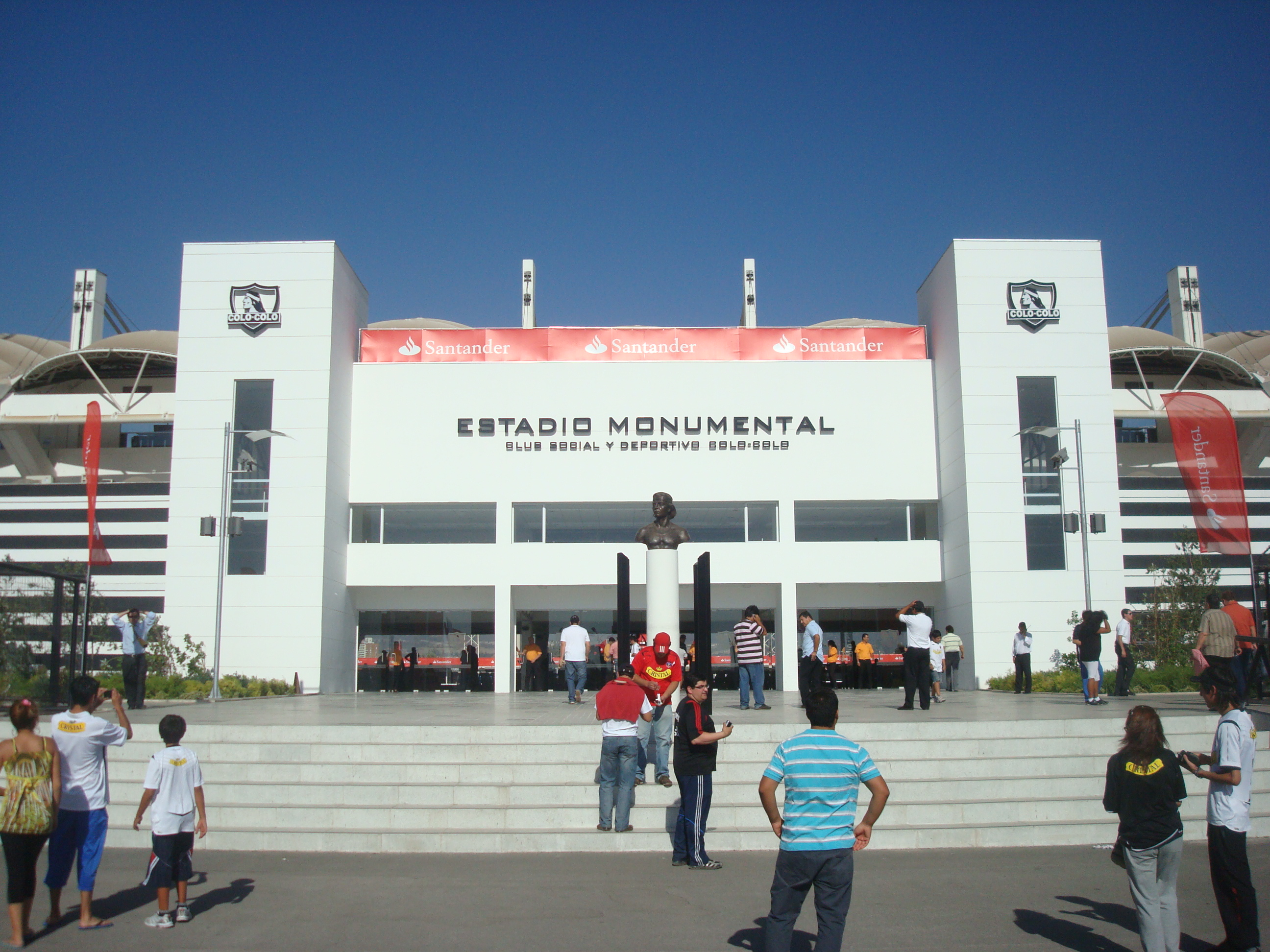 Fachada Estadio Monumental, Santiago de Chile